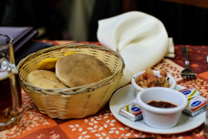 Parte de la mesa chilena es el entremes mientras esperamos la atención en los restaurantes. En la foto se puede apreciar uno típico, el cual esta conformado por mantequilla, el Pebre, Ají, panes amasados y sopaipillas.